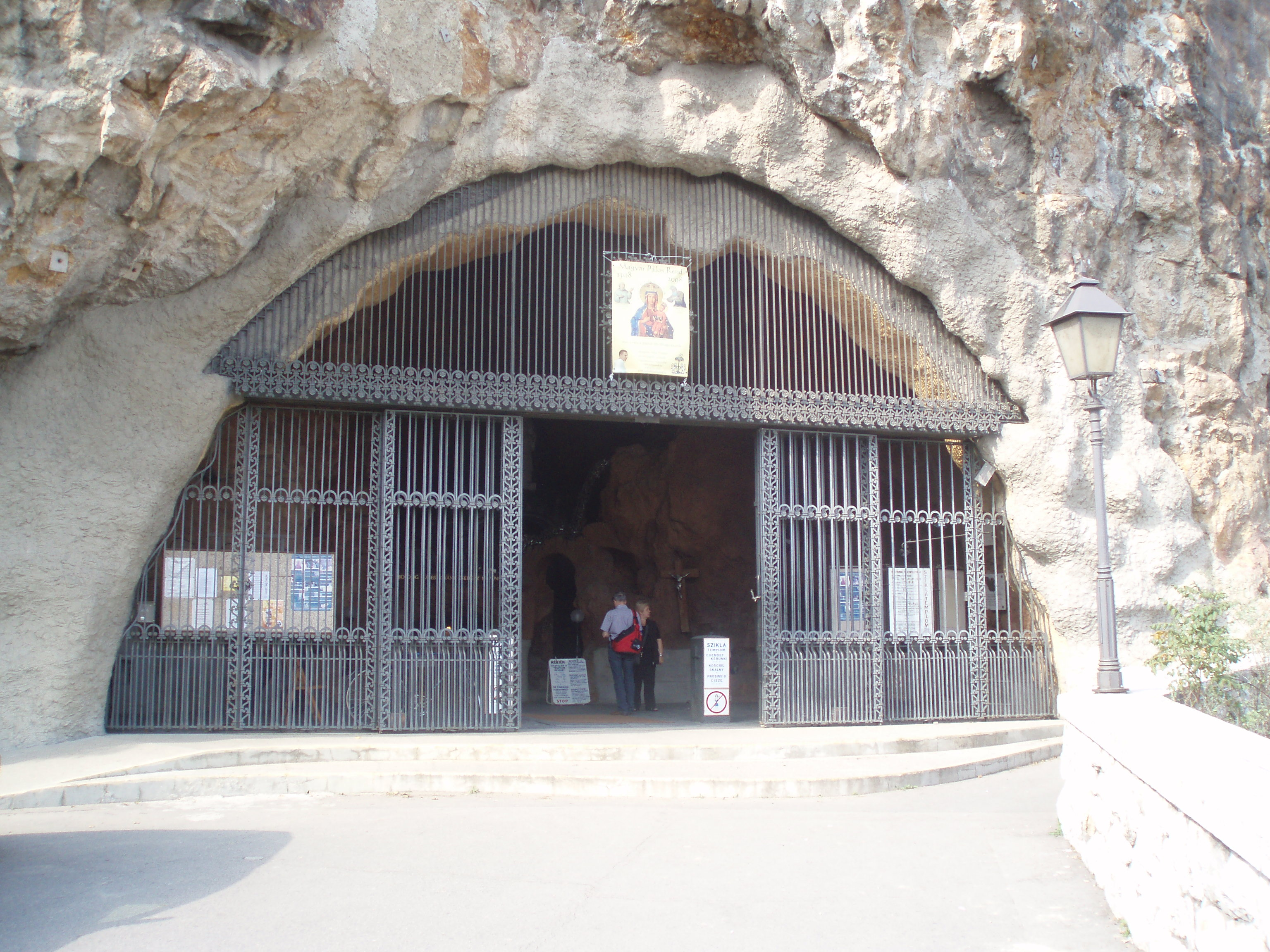 A Pálos rend sziklakápolnájának bejárata a Gellért-hegyen